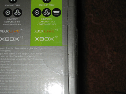 Pack Xbox 360 faisant référence à la compatibilité Xbox